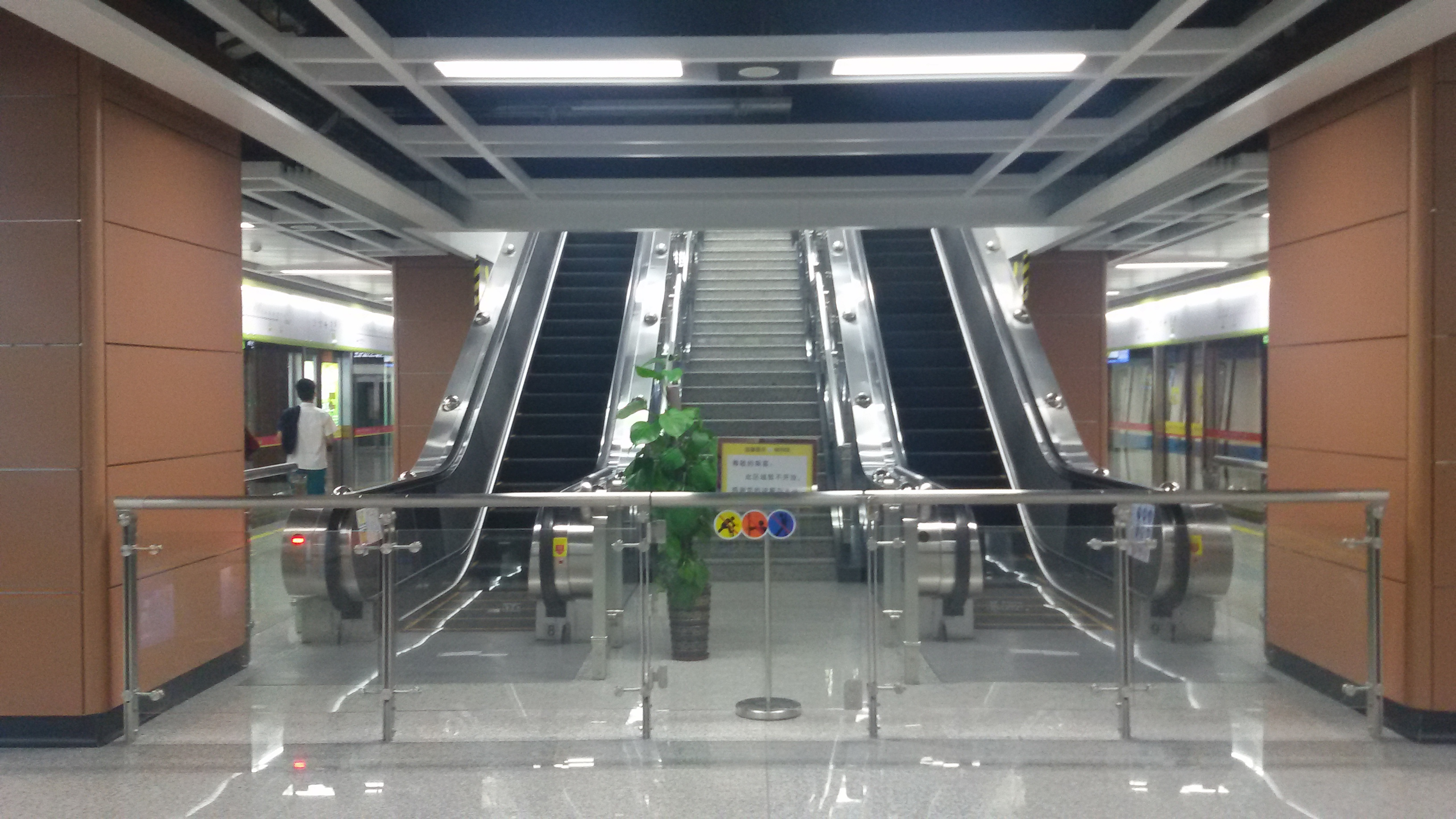 粵語: 沙涌站嘅月台東邊有事先留低咗轉車結構